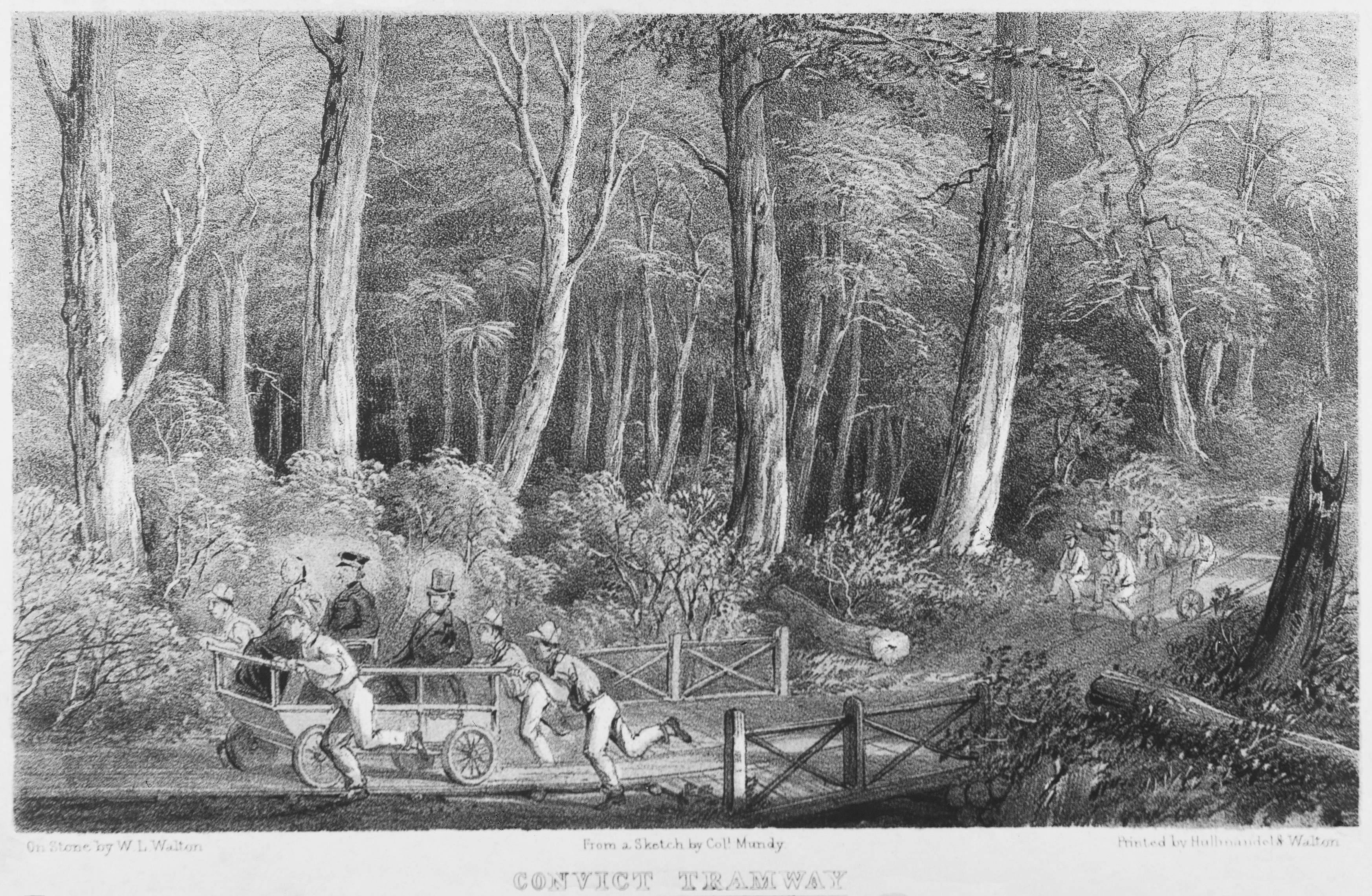 Convict Tramway (Sketch by Col. Mundy) Tasmanian Archives NS1013-1-1594